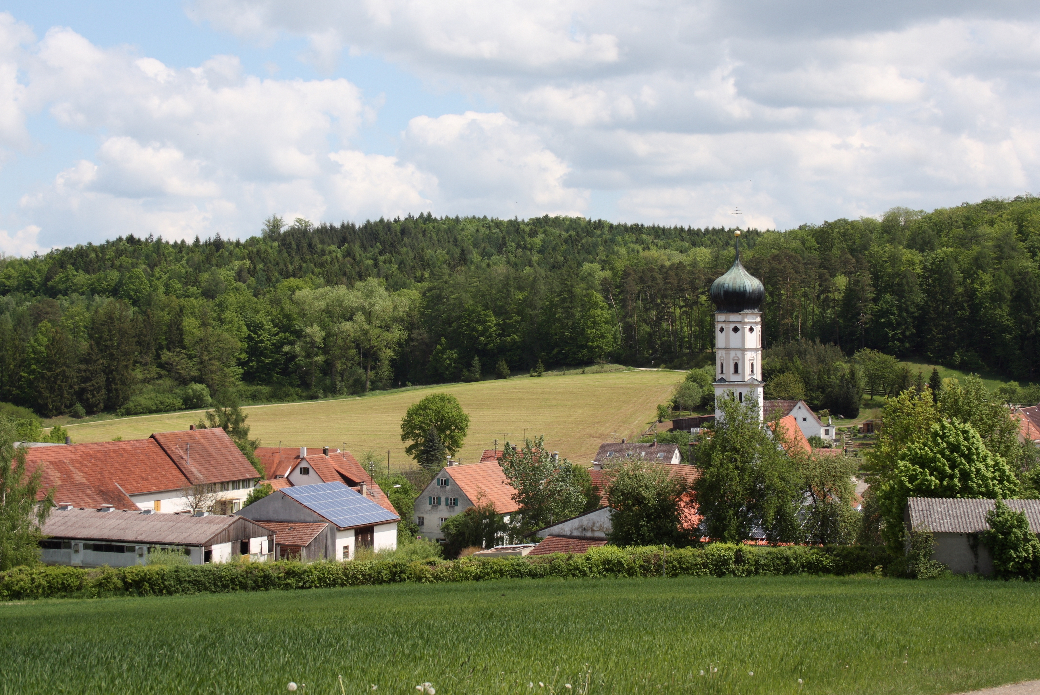 Buggenhofen, ein Ortsteil von Bissingen im Landkreis Dillingen an der Donau (Bayern), Kirchturm der Wallfahrtskirche Mariä Himmelfahrt